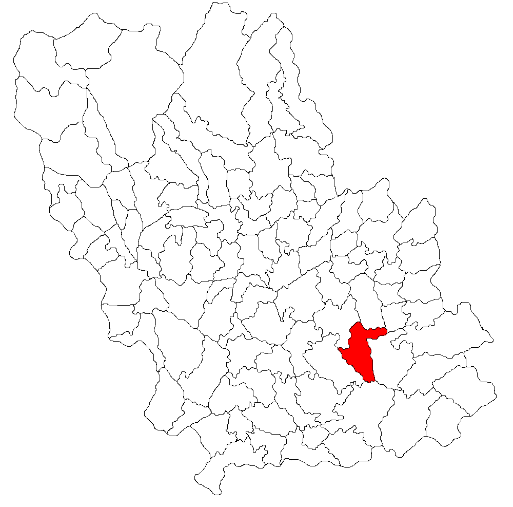 Categorie:Hărţi ale judeţului Prahova